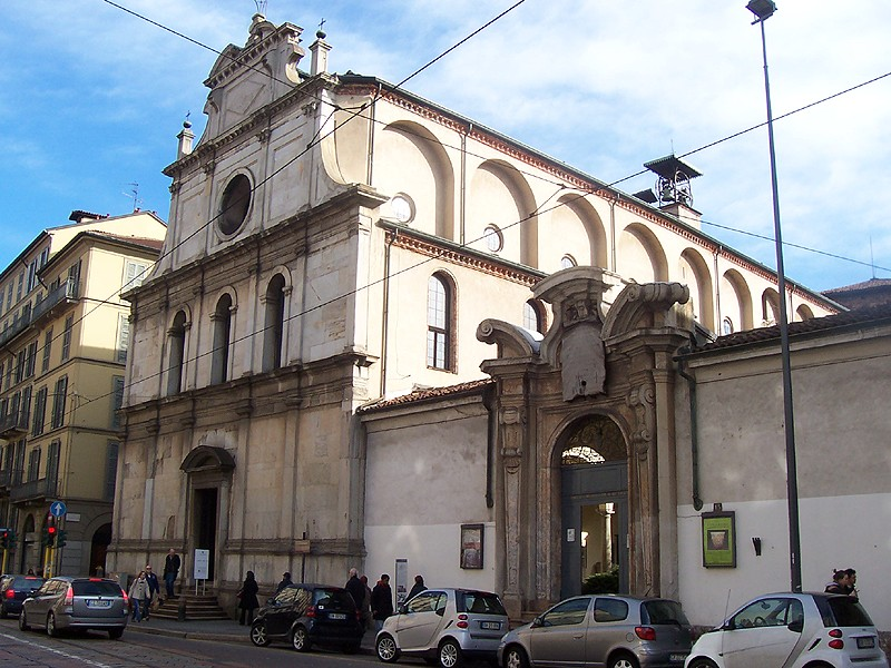 Facciata di San Maurizio al Monastero Maggiore a Milano.